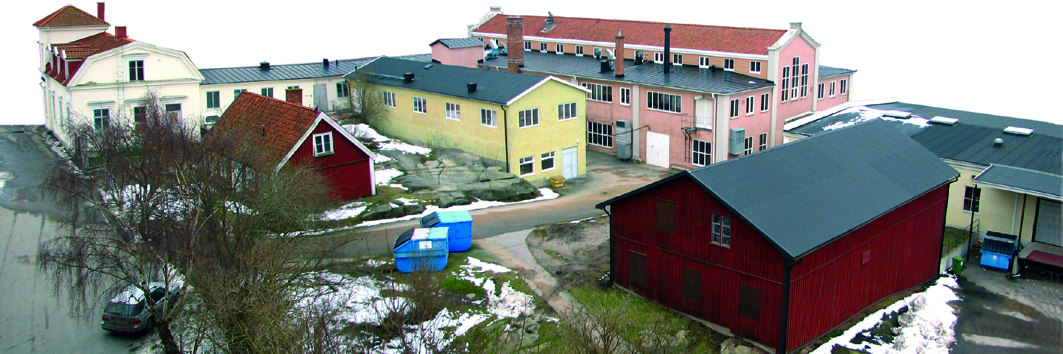 A photo of the area where Karlskrona Lampfabrik is situated taken and edited in 2006 by myself.